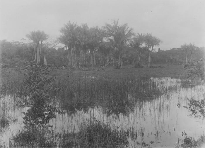 foto. Runderen grazen in een moerassig gebied met palmbomen nabij Paramaribo